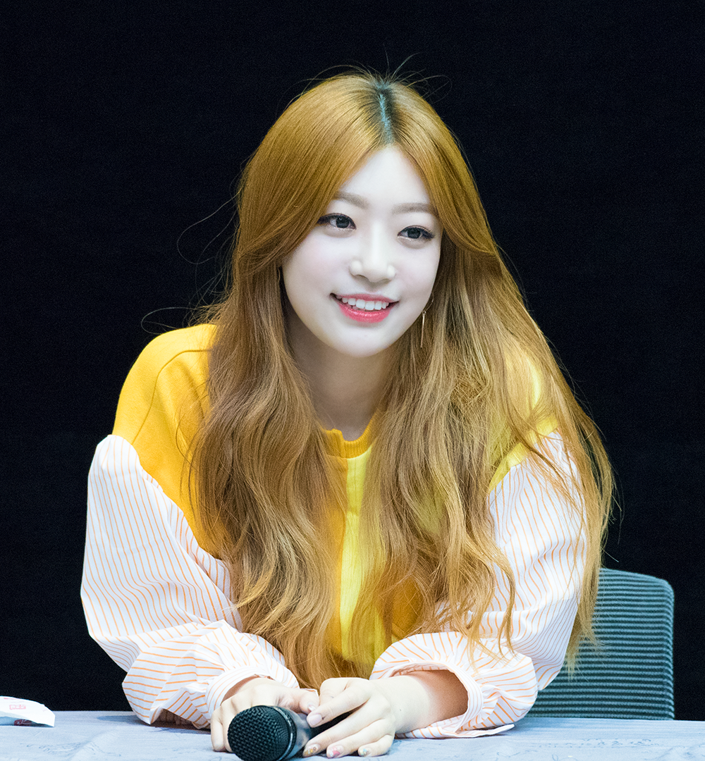 170219 소나무 (Sonamoo) 광주 팬사인회 - 수민 (SuMin)